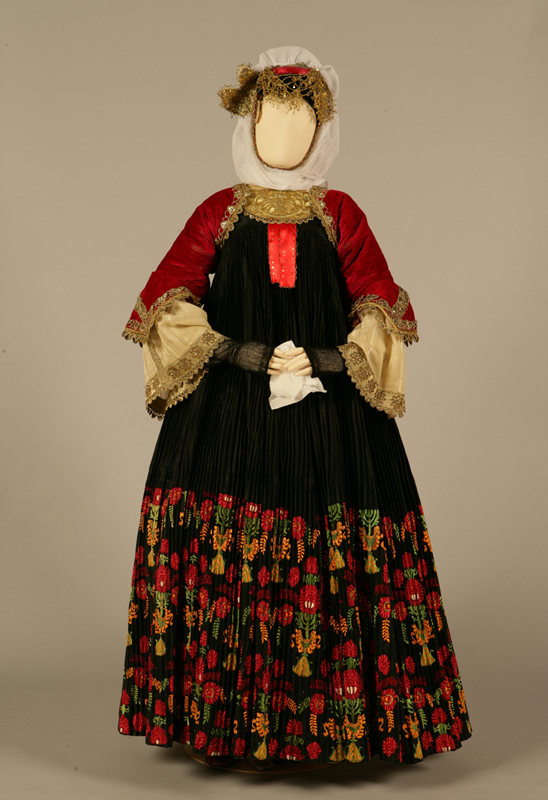 Νυφική φορεσιά Σκόπελος, Σποράδες. Αρχές 20ού αιώνα Συλλογή Πελοποννησιακού Λαογραφικού Ιδρύματος, Ναύπλιο